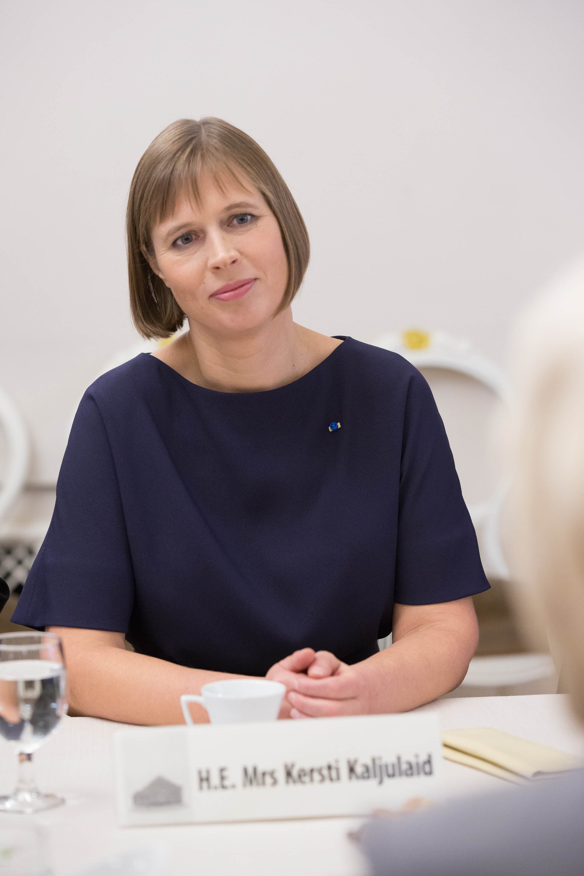 2016.gada 21.oktobris. Saeimas priekšsēdētāja Ināra Mūrniece tiekas ar Igaunijas Republikas prezidenti Kersti Kaljulaidu (Kersti Kaljulaid). Foto: Ernests Dinka, Saeimas Administrācija Izmantošanas noteikumi: saeima.lv/lv/autortiesibas